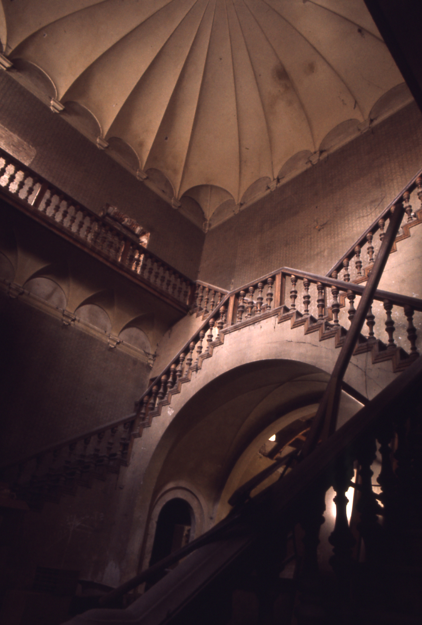 Servizio fotografico : Ferrara, 1974 / Paolo Monti. - Foglio: 1, Fotogrammi complessivi: 20/20 : Diapositiva, sviluppo cromogeno/ pellicola ; 35 mm. - ((Sullo chassis della diapositiva n. 01 iscrizione manoscritta: "Fe". - Confronti con negativi (b/n - gelatina bromuro d'argento/ pellicola -35mm). - . - Occasione: Campagna di rilevamento del centro storico. - Fonte: Rubrica di Paolo Monti: Diapositive 24x36mm (1948-1982), presso Archivio Paolo Monti. Rubrica con elenco soggetti e numeri di inventario (da 1 a 1000) corrispondenti ai fogli a tasche in pvc in cui sono contenute le diapositive. - Fonte: Fattura di Paolo Monti: IV. Commesse/ Fattura n. 18/ Riprese fotografiche del centro storico (Mostra Vitalità del centro storico) (1974/10/16), presso Archivio Paolo Monti